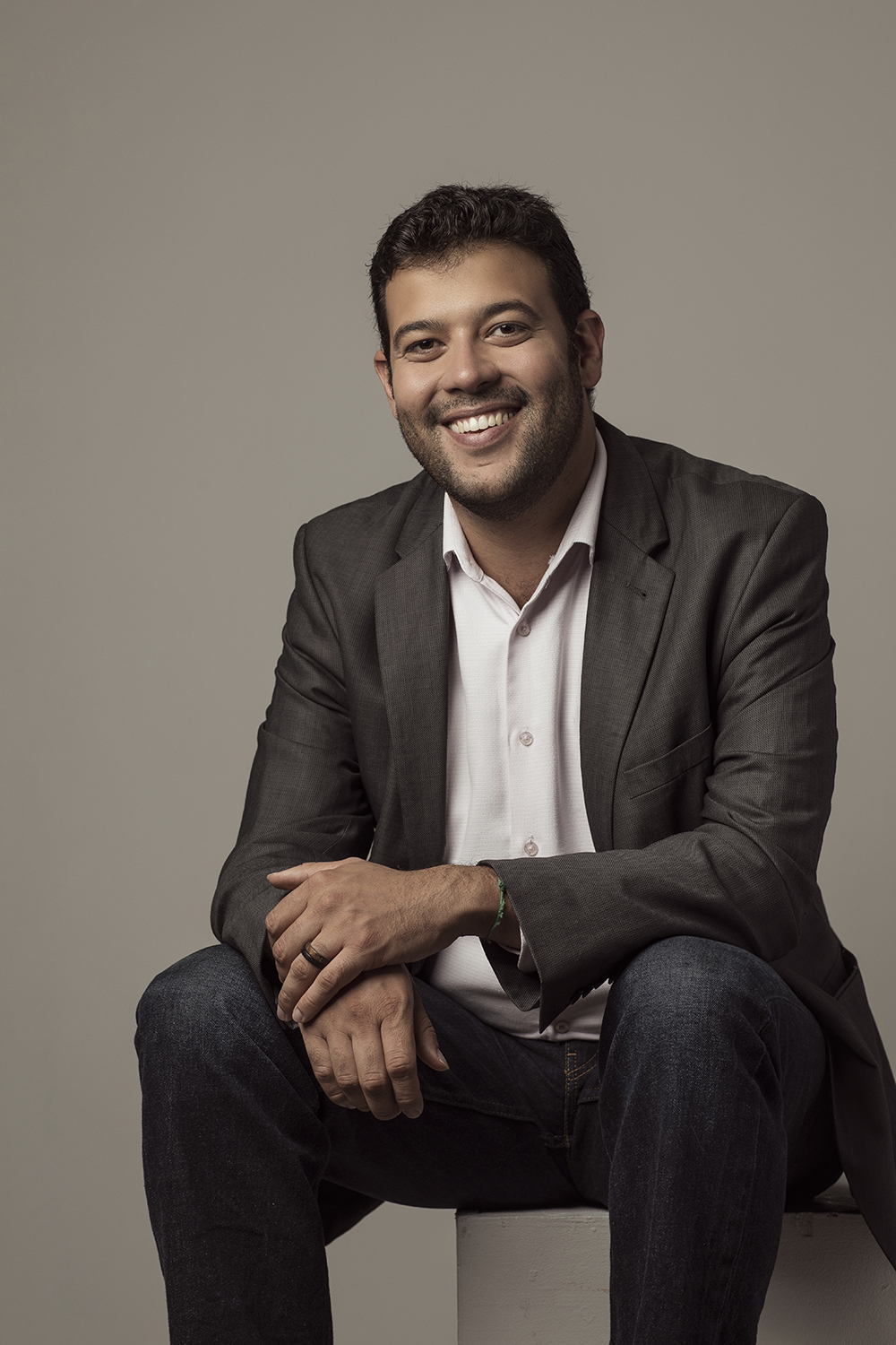 Fotografia pessoal